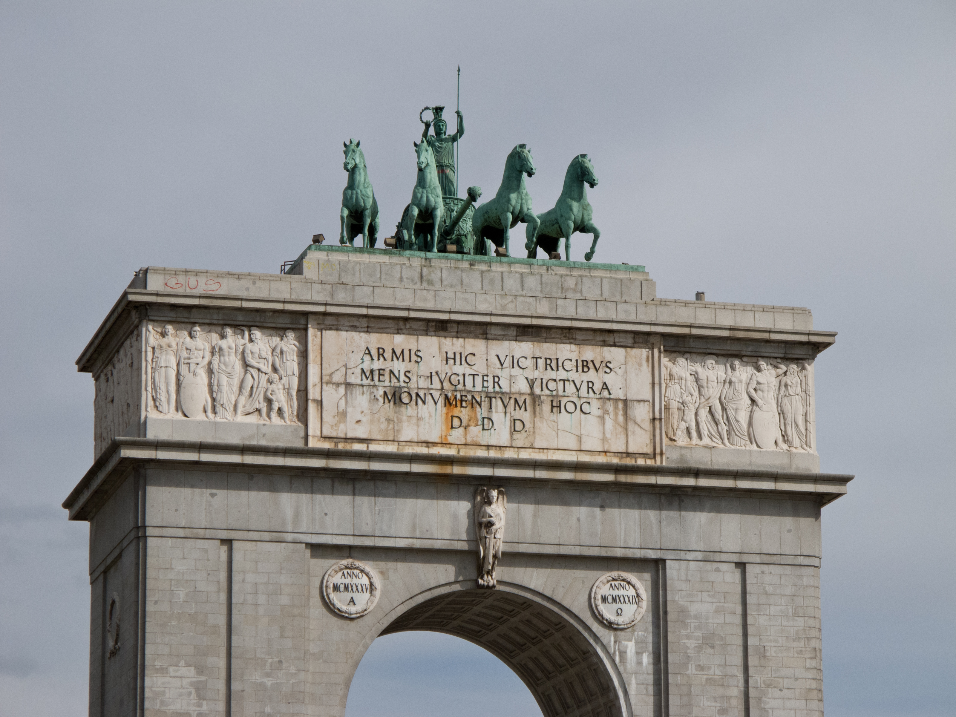 Arco de la victoria, Madrid, España.